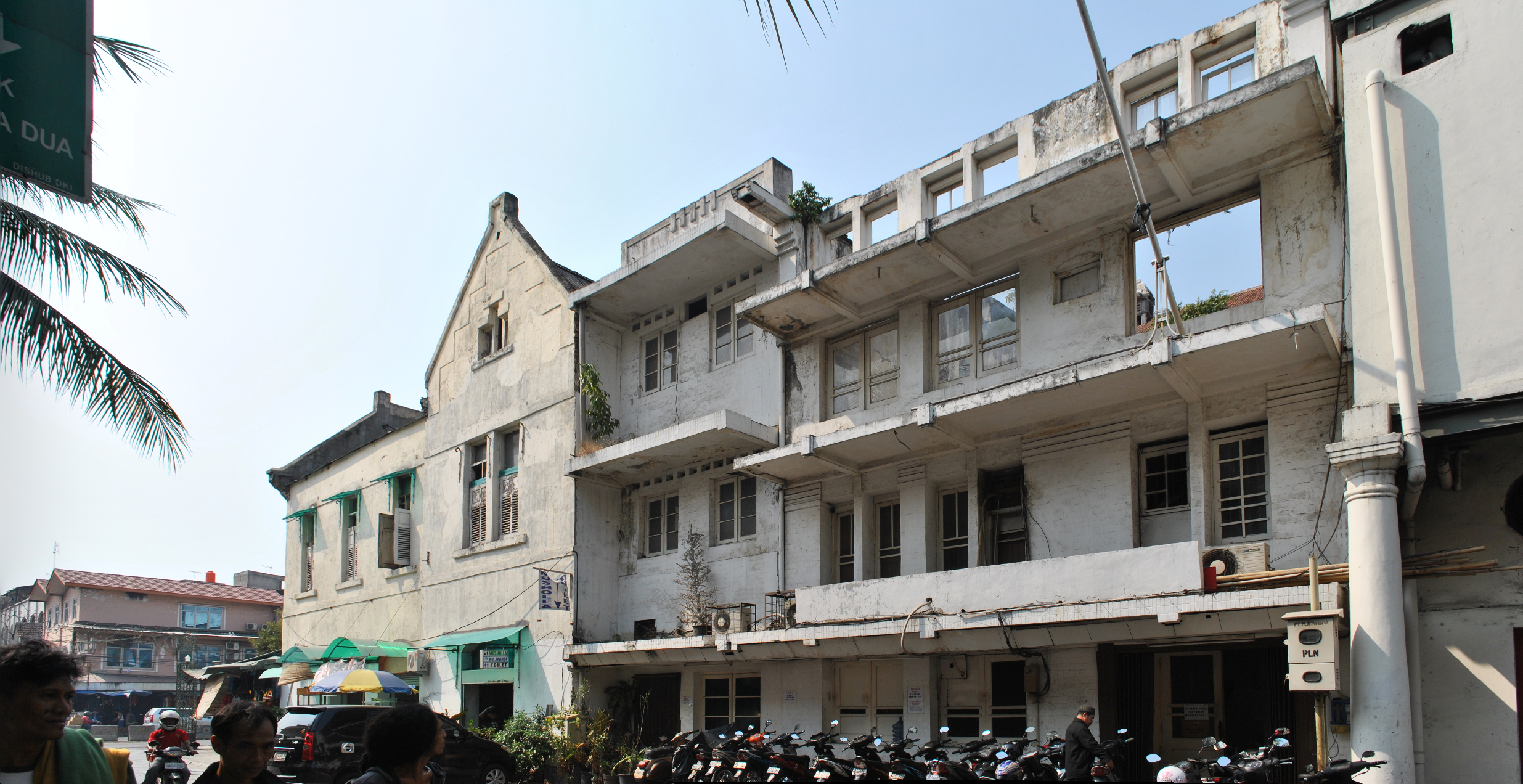 Sederet bangunan di Kota Tua